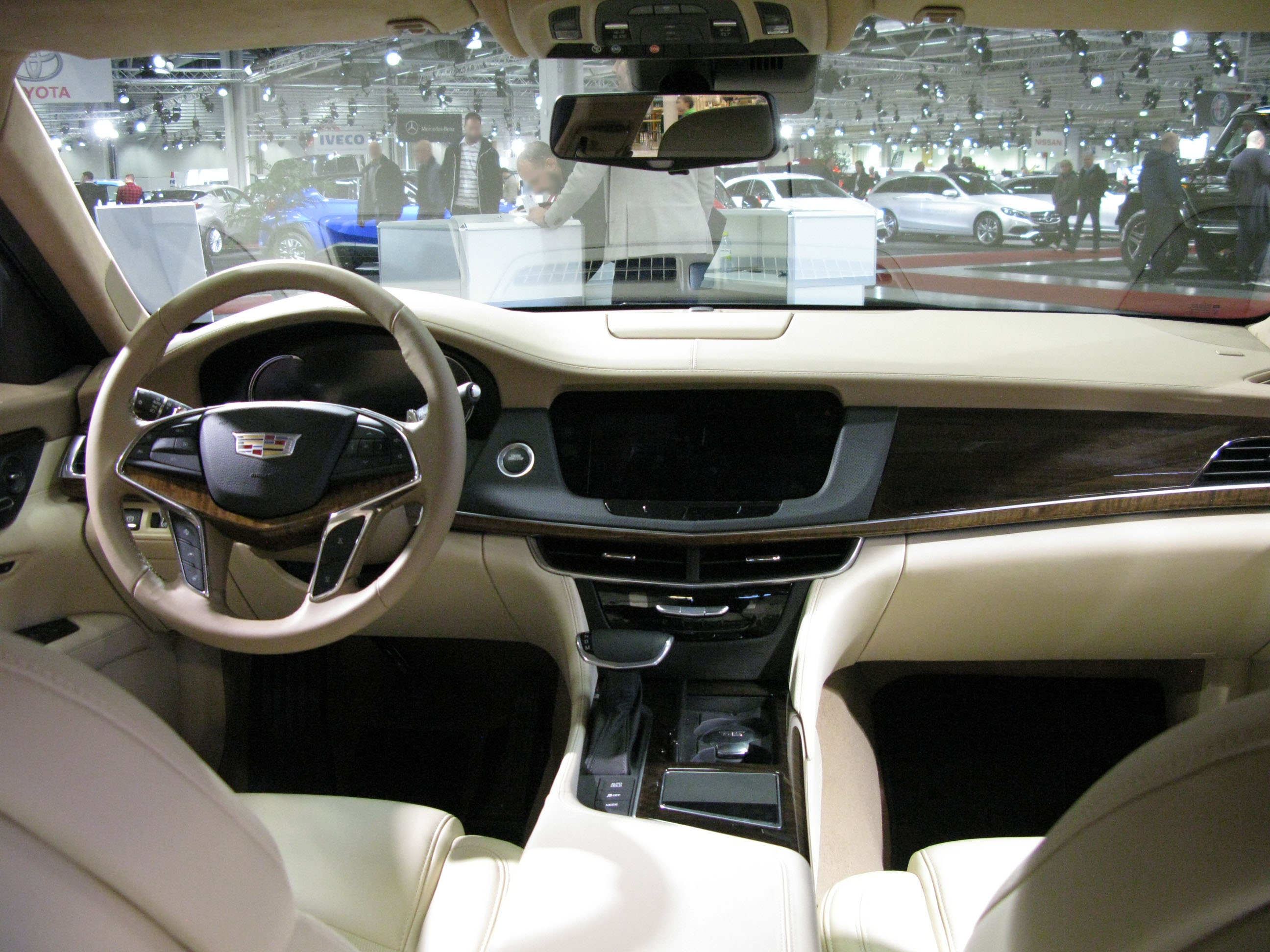 2017 Cadillac CT6